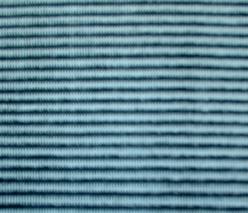 Wirk-Plissee